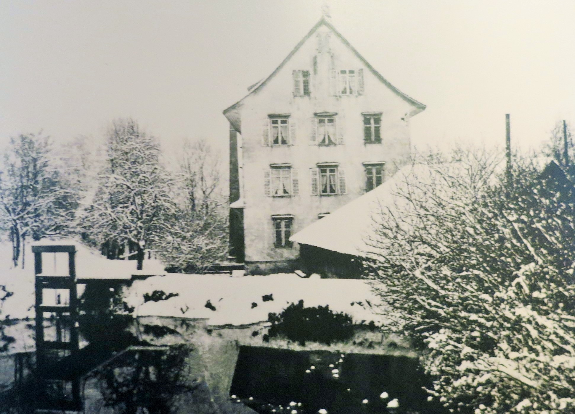 Vollenweider AG, Horgen ZH, Schweiz (Ortsmuseum Sust Horgen)